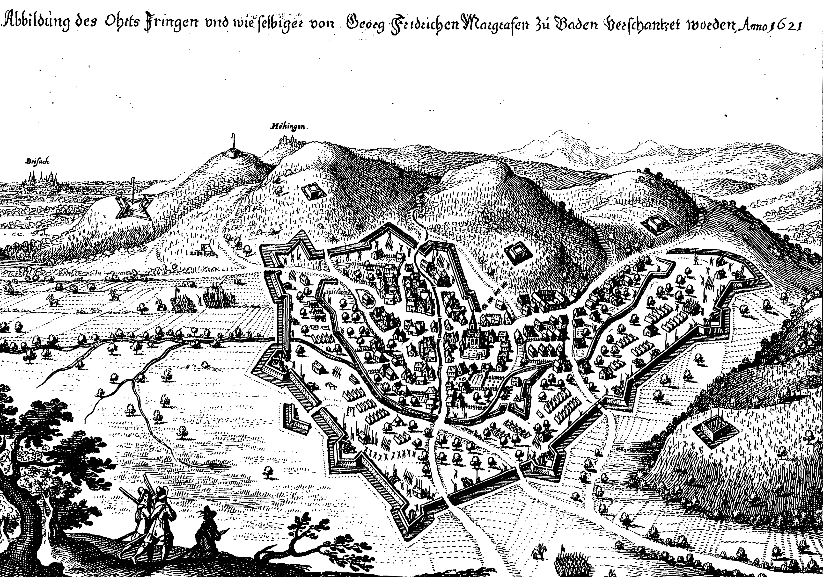 Abbildung des Ohrts Iringen und wie selbiger von Georg Friedrichen Margrafen zu Baden verschanzet worden Anno 1621